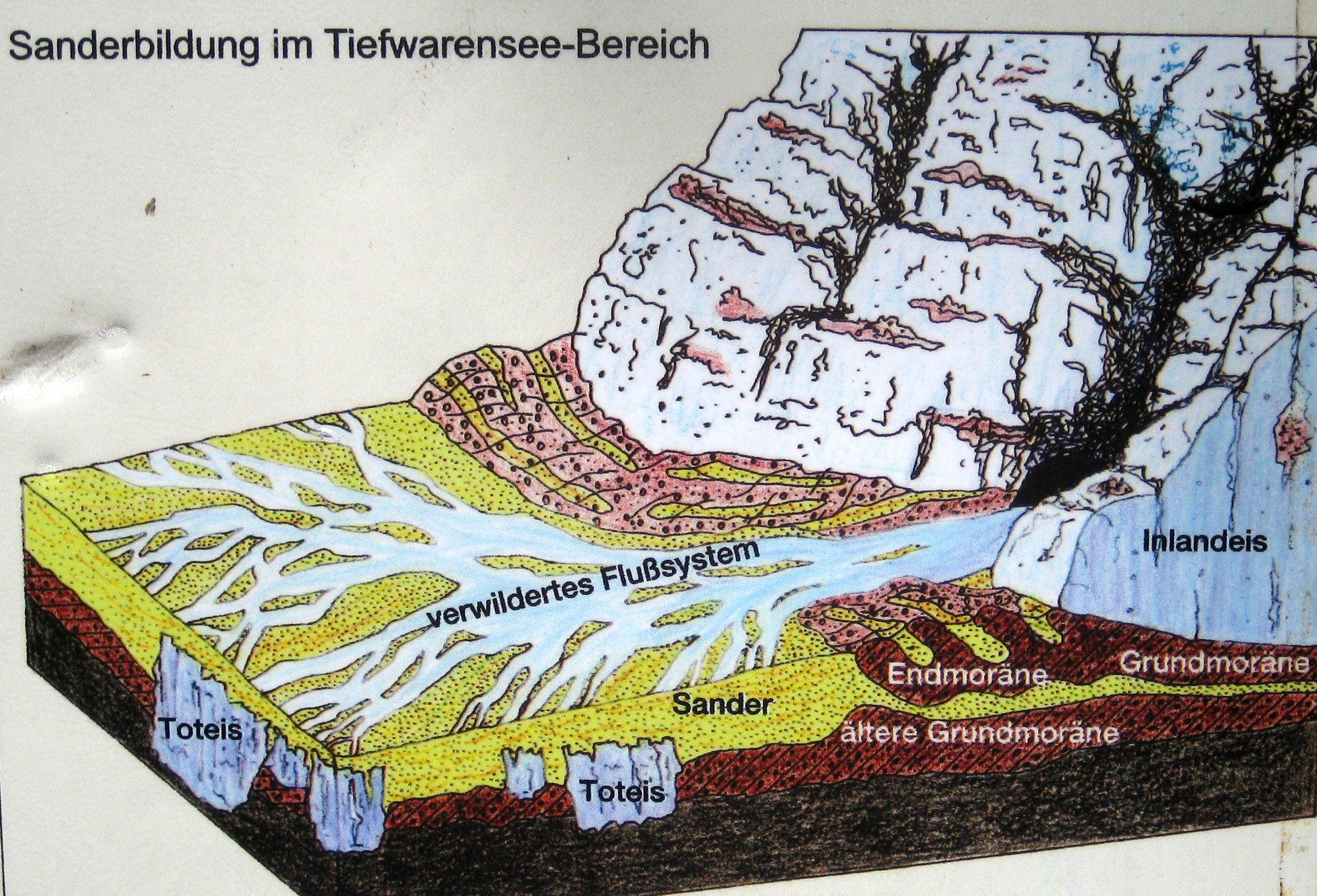 Erläuterungstafel an Station 6 des Eiszeitlehrpfads Tiefwarensee (Sanderbildung im Tiefwarensee-Bereich)